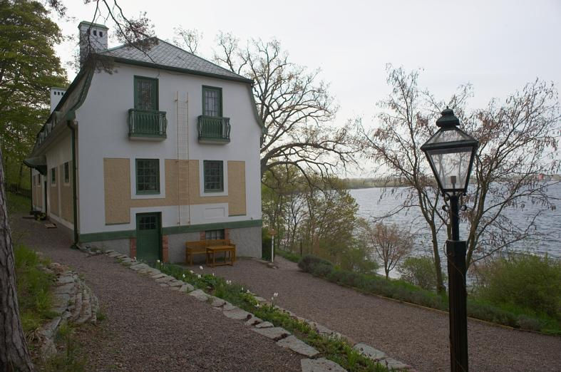 Författarinnan Ellen Key¿s (1849-1926) hem från 1911 och fram till sin död. Huset ligger strandnära i en brant sluttning ned mot Vättern. Huset uppfördes 1910-1911. Motiv: Ombergs Kronopark 1:2 Nyckelord: Byggnadsminnen, Naturreservat, Riksintressen Kategori: Museum, Bostadshus Författarinnan Ellen Key¿s (1849-1926) hem från 1911 och fram till sin död. Huset ligger strandnära i en brant sluttning ned mot Vättern. Huset uppfördes 1910-1911. Ombergs Kronopark 1:2.